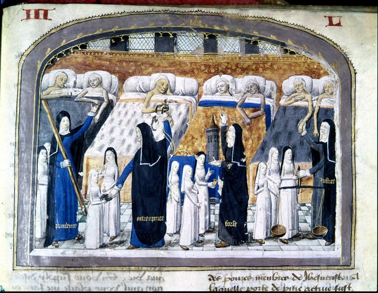 Manuscrit enluminé de la fin du 15e siècle, écrit par Jehan Henry († 1483). Cette enluminure évoque une salle de malades typiquement médiévale.